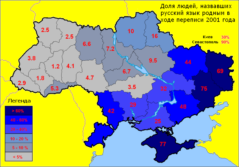 Доля рускамоўных сярод усяго насельніцтва Украіны па рэгіёнах (паводле дадзеных перапісу 2001 года)